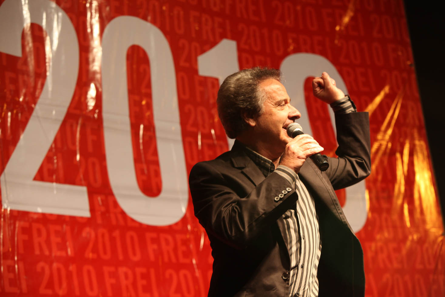 José Alfredo Fuentes, conocido popularmente como El Pollo Fuentes (n. Santiago de Chile, 25 de octubre de 1947), es un destacado cantante y presentador de televisión chileno.